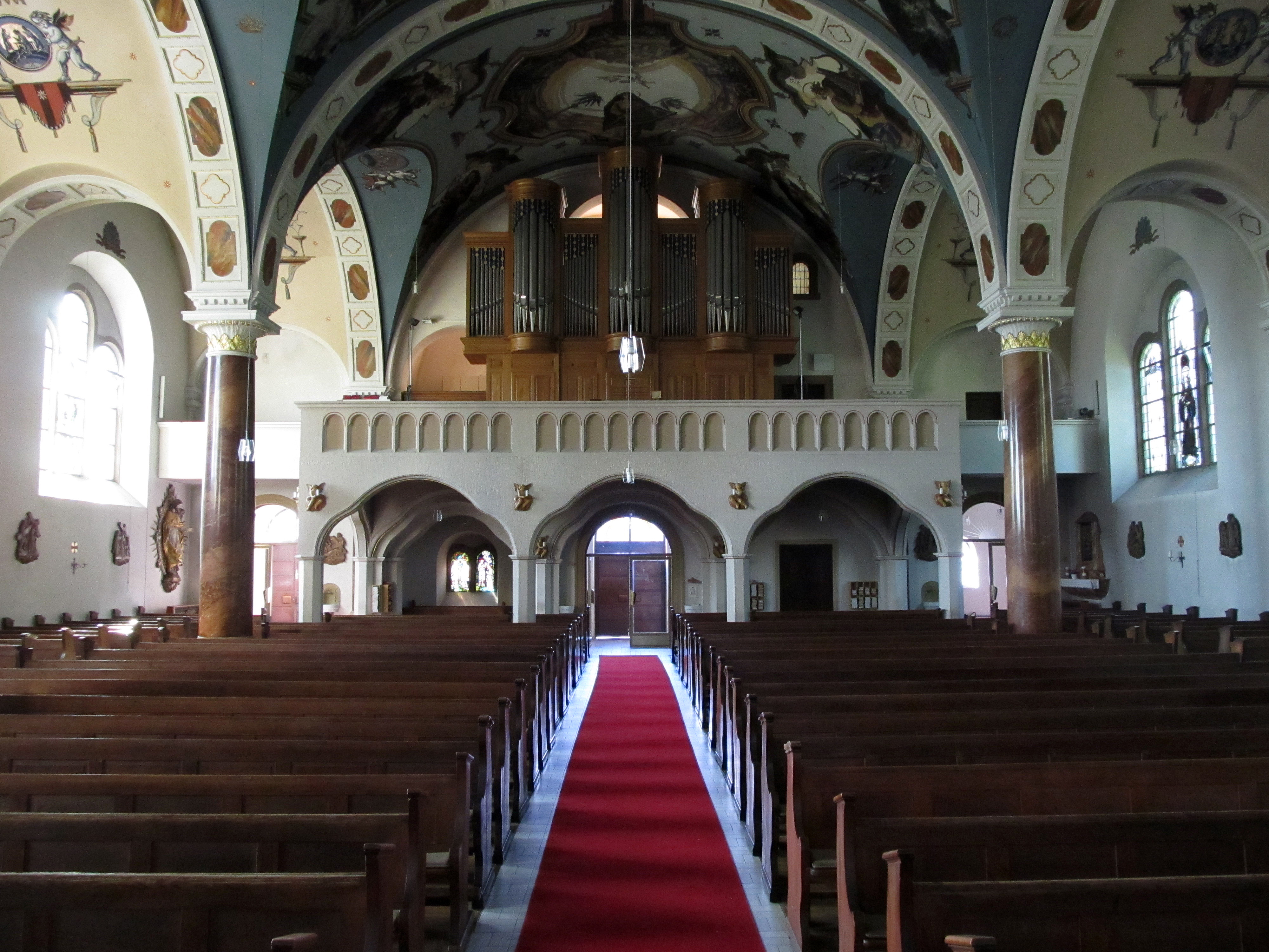 Blick ins Innere der katholischen Pfarrkirche St. Aloysius in Steinbach, einem Stadtteil von Lebach, Saarland